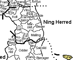 Kort der viser Tunø Sogn, Ning Herred, Århus Amt, Denmark.